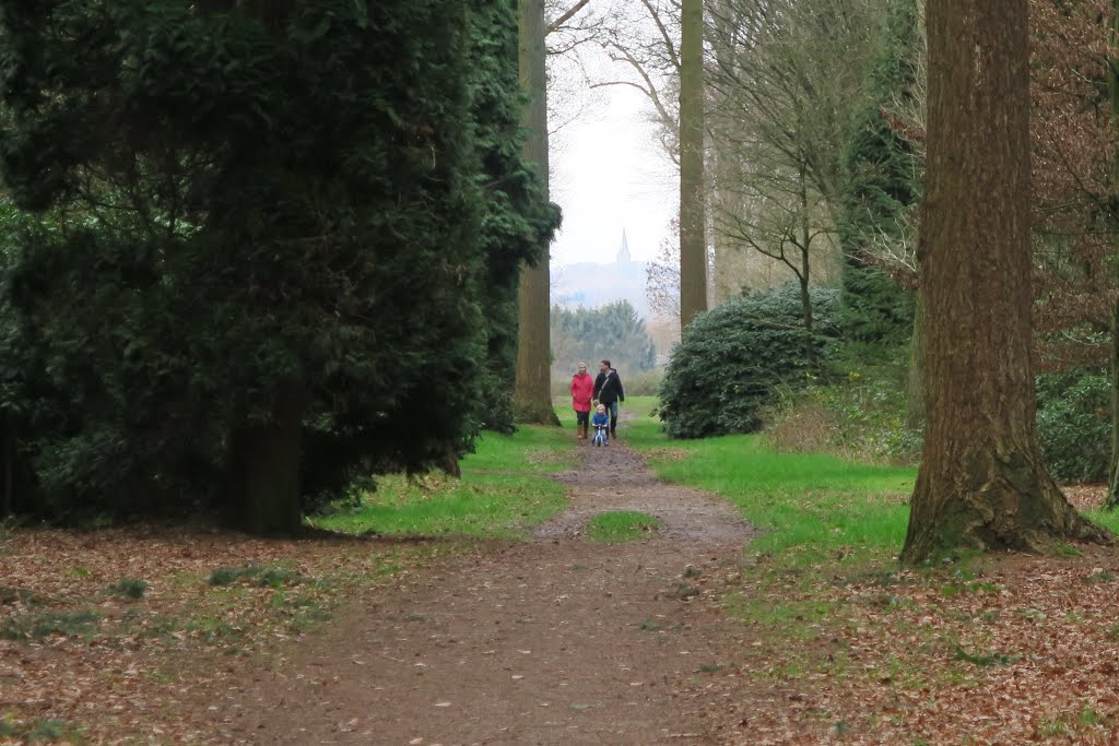 Hof van Bergh. Zichtas op Hoch Elten (D.)